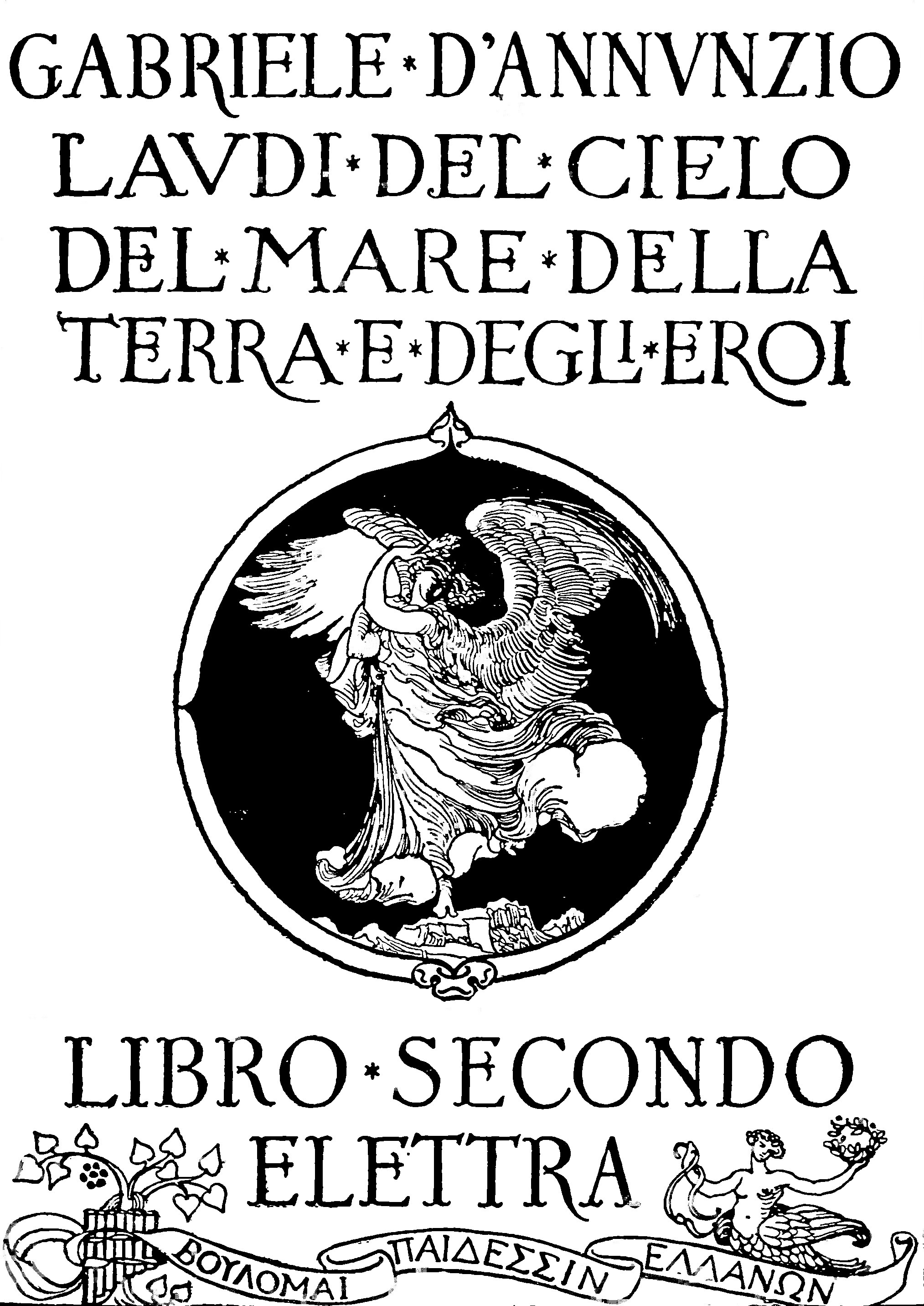 Raccolta di poesie di Gabriele D'Annunzio. libro 1. Maia. - libro 2. Elettra. - libro 3. Alcione. - libro 4. Merope.